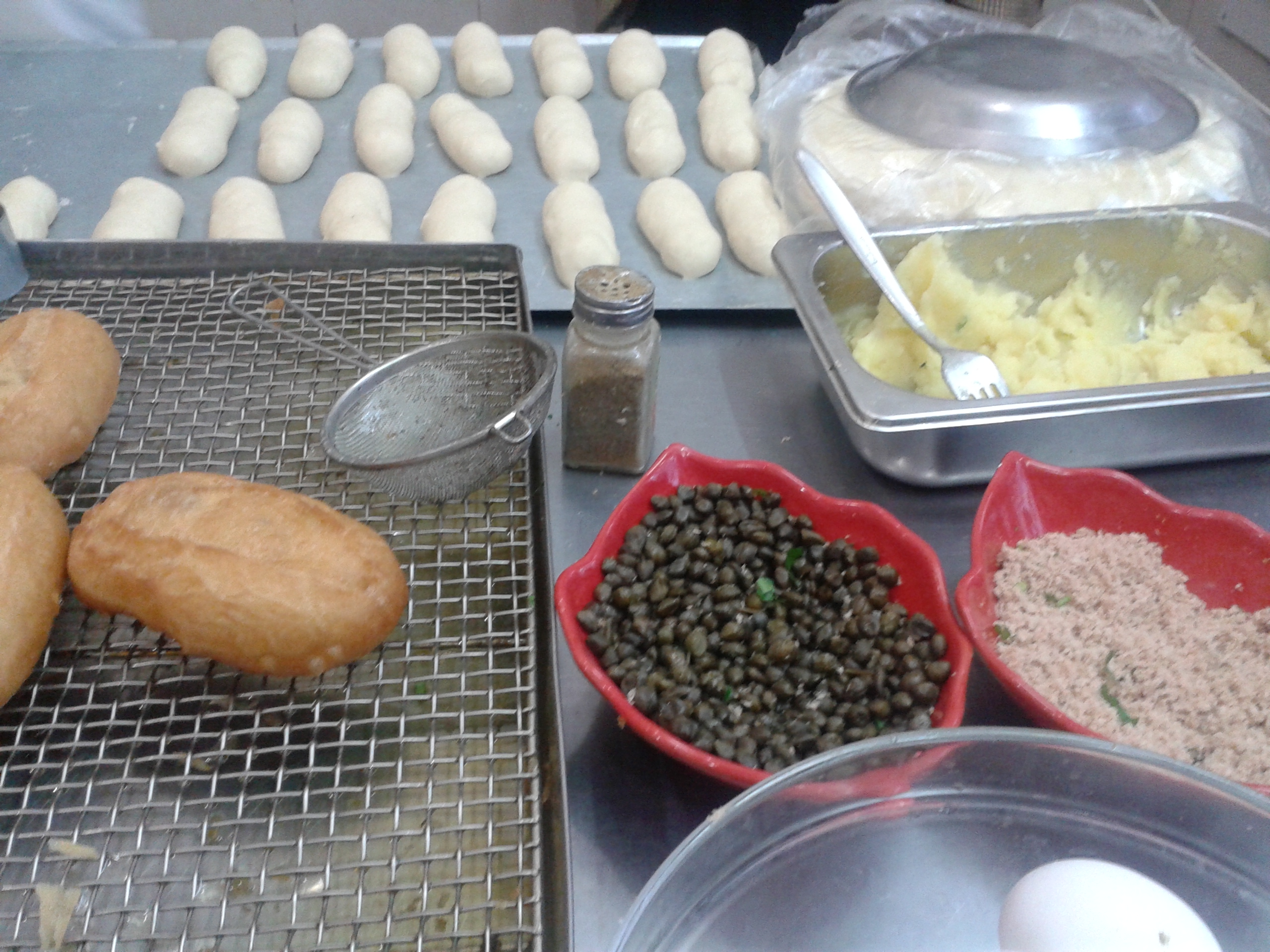 c'est simple et c'est bon This is an image of food from Tunisia